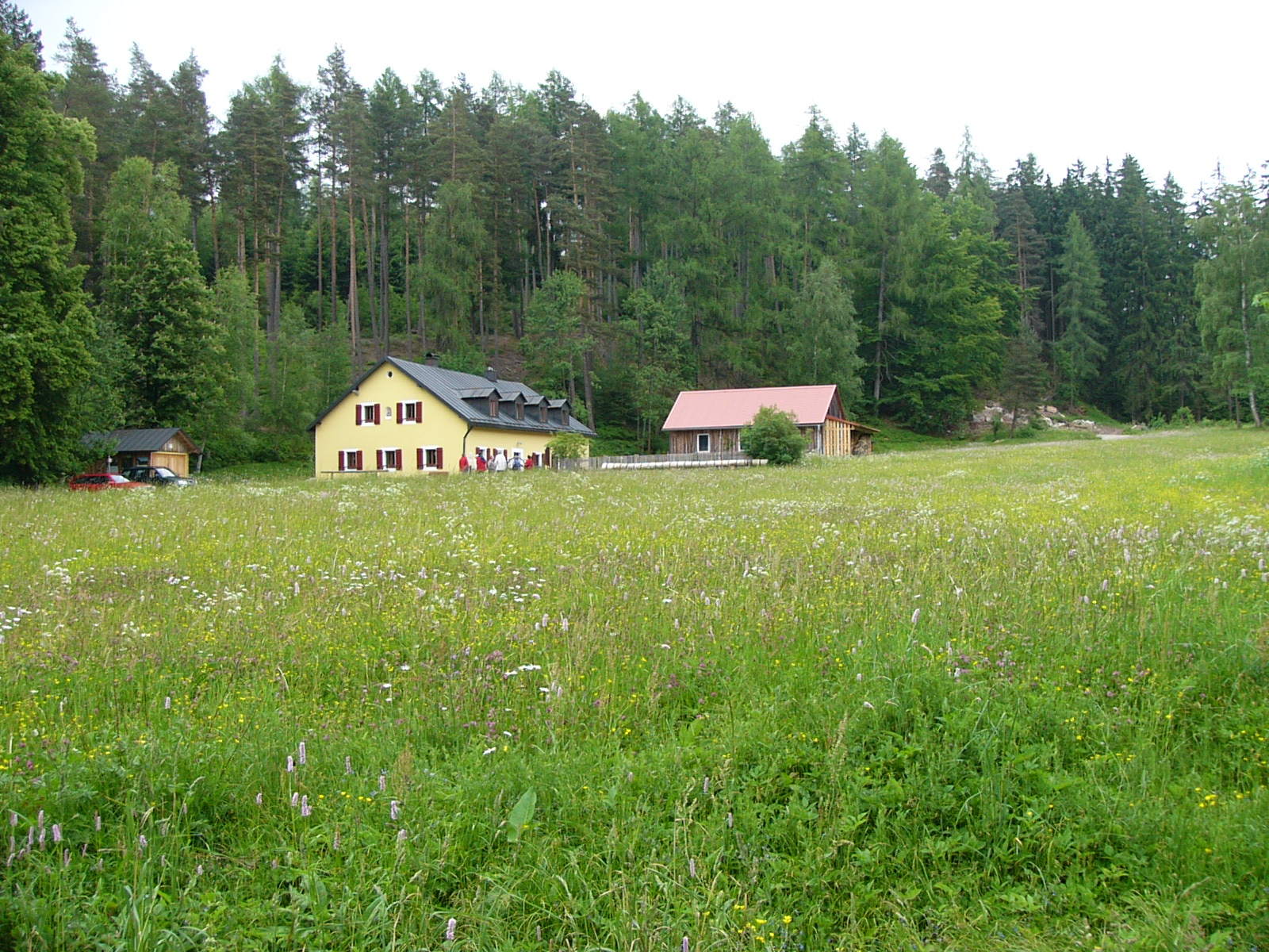 Glasschleif, Ansiedlung und historische Werkstätte